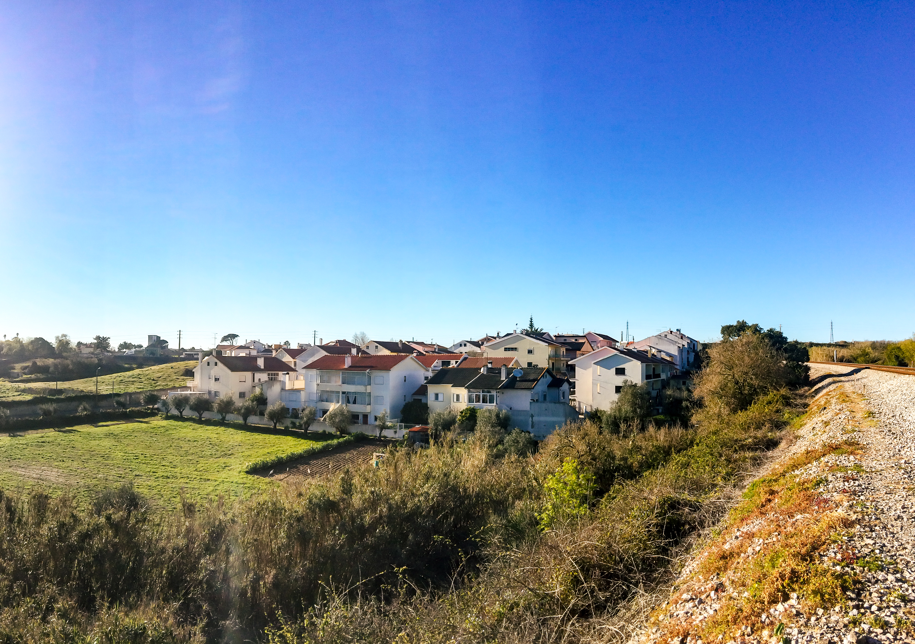 Casal da Mata, Telhal.